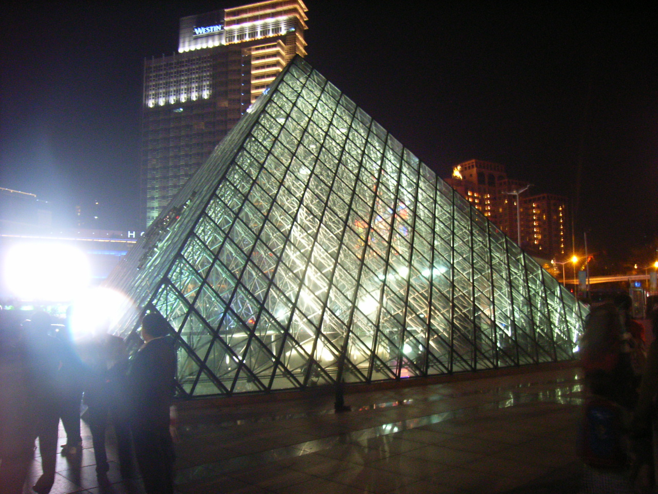 深圳zh:華僑城zh:世界之窗